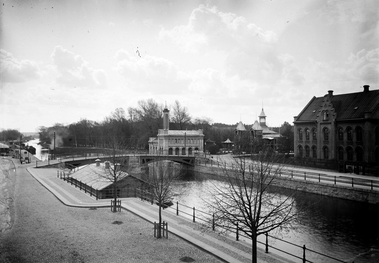 Fyrisån, Pumphuset, Flustret och Anatomiska institutionen, Uppsala, sannolikt 1880-tal. Flickr data on 2011-08-24: Tags: Uppland, Uppsala, Sweden, Osti, Henri Osti License: CC BY 2.0 User: Upplandsmuseet Upplandsmuseet Länsmuseum för Uppsala län